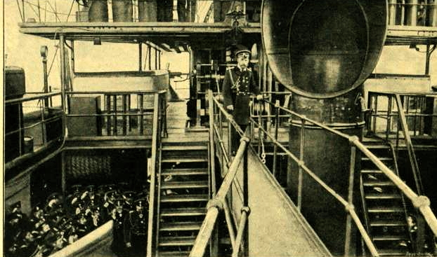 Tsar Nicholas II aboard Knyaz Suvorov, 1904